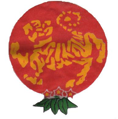 Escudo de el Soke Ishikawa dond entre el cuerpo de el tigre se encuentra oculto escrito el apellido de el Soke Ishikawa.